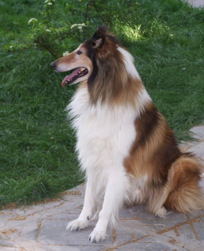 Prenses Aksay isimli bir dişi köpek.